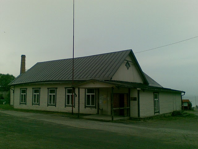 Viinistu rahvamaja.